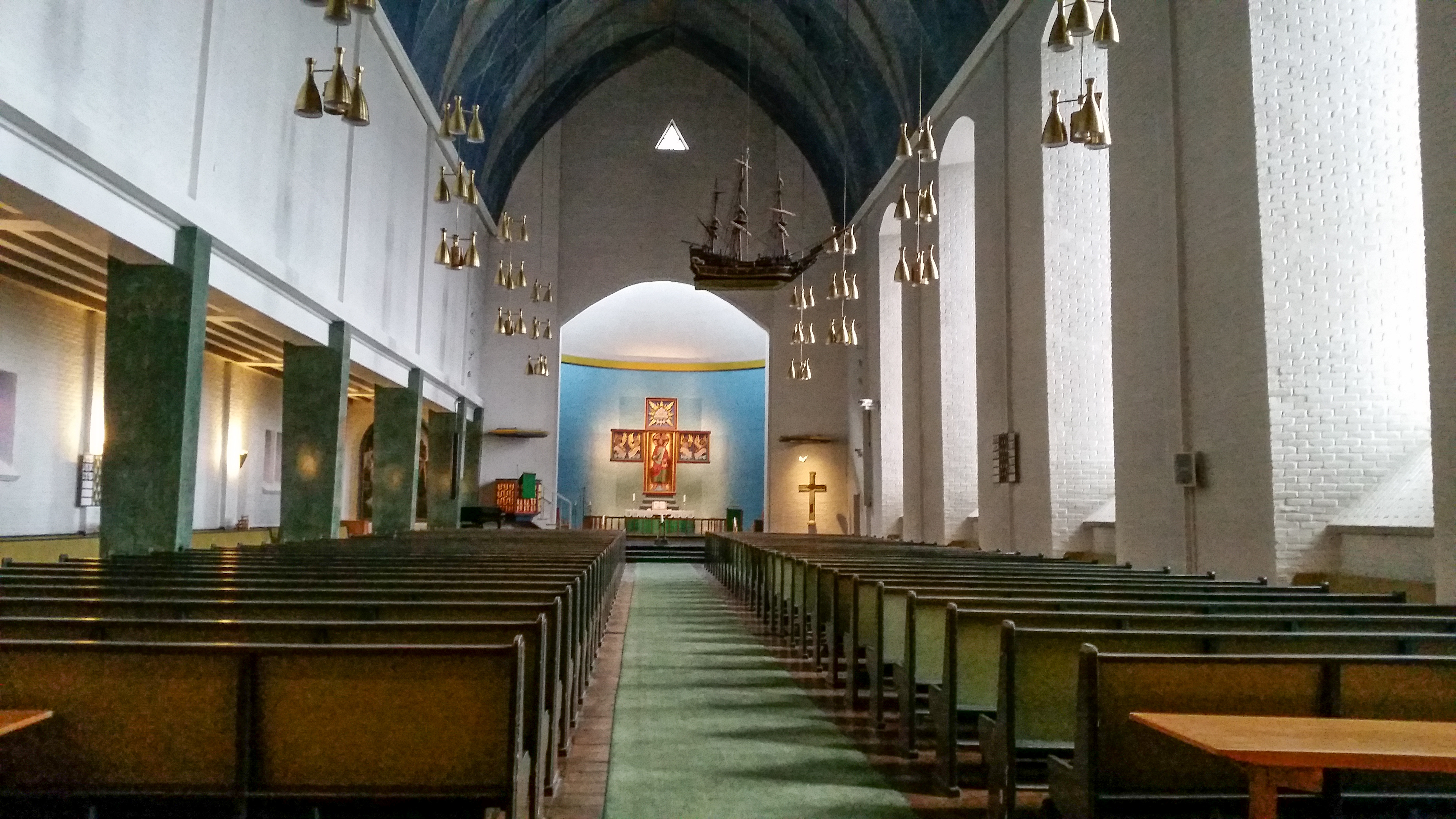 Molde domkirke, interiør